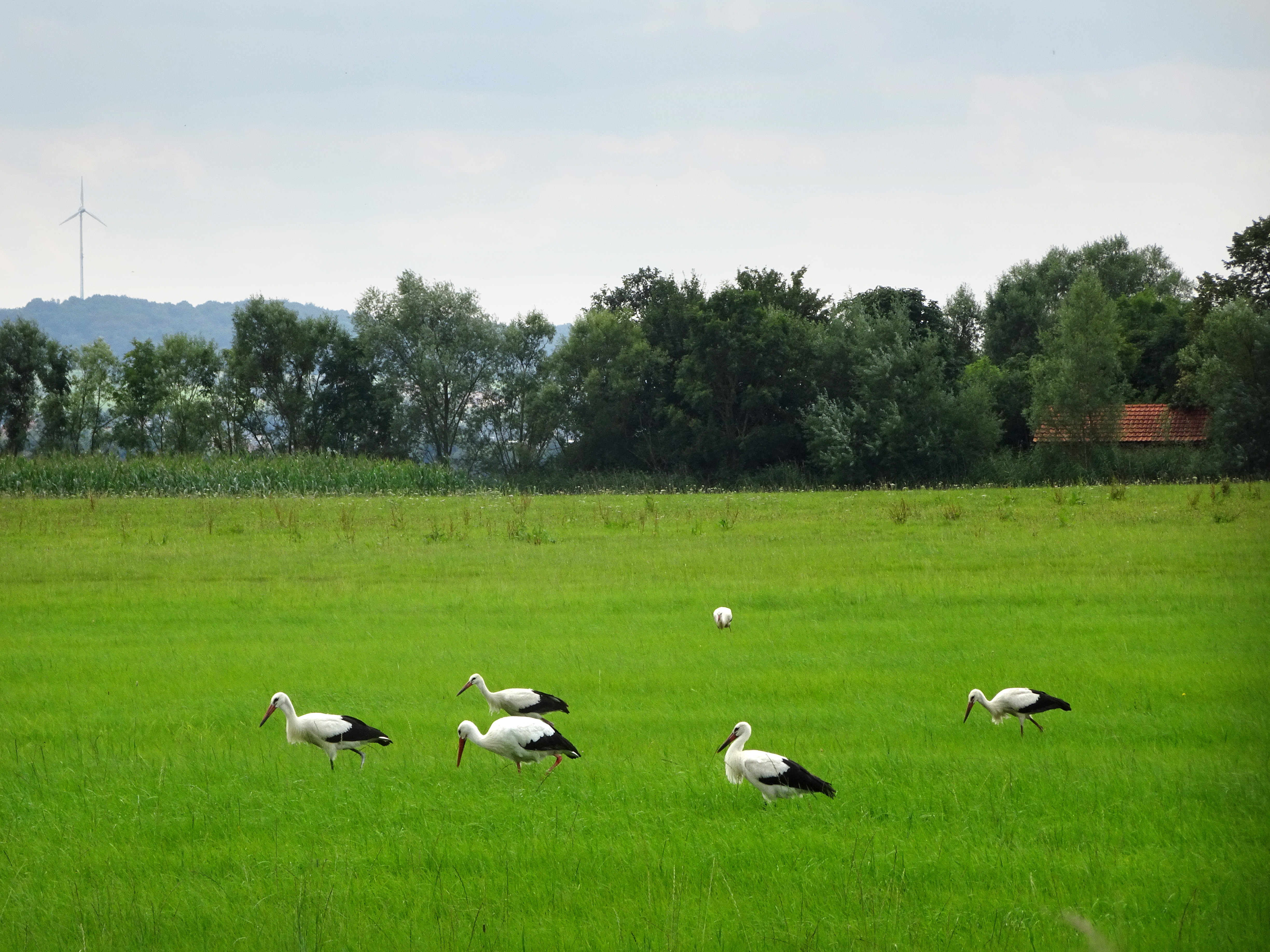 Aue bei Gerstungen im Wartburgkreis vom Werratal-Radweg aus gesehen. EU-Vogelschutzgebiet Werra-Aue zwischen Breitungen und Creuzburg in Thüringen. Gebietsnummer 5127-401. Das Gebäude in der Baumreihe rechts ist eine ehemalige Transformatorenstation, das heutige Anglerheim "Pferderasen".